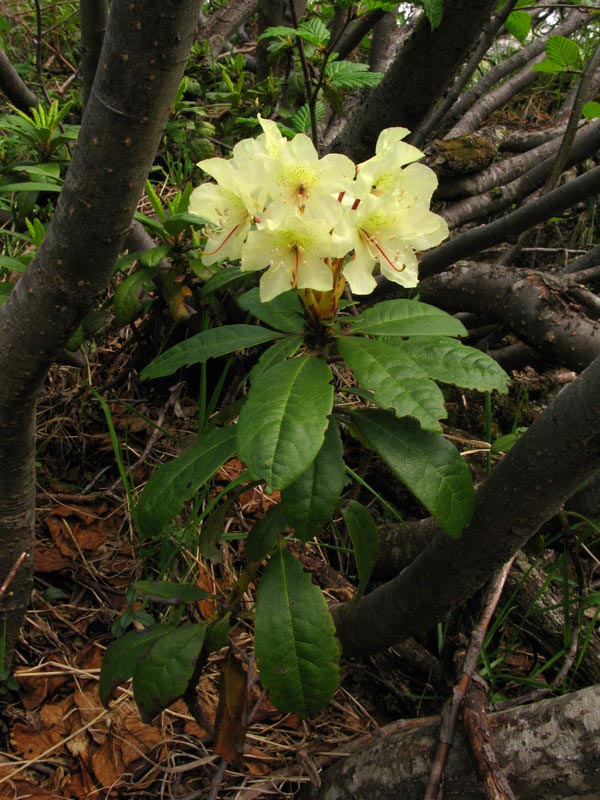 Цветущий рододендрон золотистый (Rhododendron aureum). Западный Саян, парк "Ергаки", криволесье у границы леса.